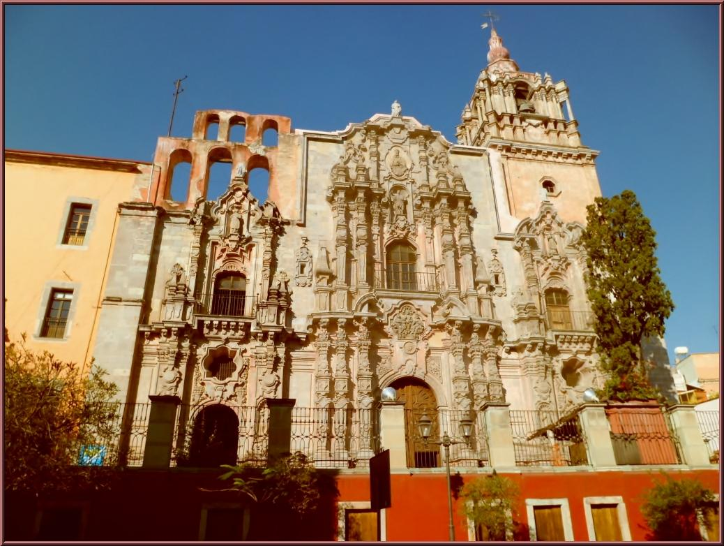 Congregación del Oratorio de san Felipe Neri Oratorianos Construido a partir de 1747 por iniciativa de José Manuel Sardaneta, primer marqués de Rayas, quien costeó casi toda la construcción, se concluyó en 1765. En una roca tallada sobre el templo se señala que realizó su traza Fray José de la Cruz, pero que quien dirigió los trabajos fue el arquitecto y constructor de retablos Felipe de Ureña. Considerado como el templo de mayores dimensiones de la ciudad, la fachada, tallada en piedra rosa, es de estilo barroco churrigueresco. La cúpula es neoclásica, de 1883; la original se desplomó ochenta años antes. Tras la expulsión de los jesuitas de Nueva España, la iglesia pasó a la Congregación del Oratorio de San Felipe Neri y fue reabierta en 1794. Su sacristía contiene una excelente colección de pintura virreinal, con obras de Miguel Cabrera, Baltasar Echave Orio o José Ibarra. Muy cerca, en la plazuela de los Carcamanes, culminó una historia trágica de amor y celos que se inició en esta iglesia cuando informaron a uno de los dos hermanos Carcamán que su otro hermano cortejaba a la misma mujer que él amaba. Sin dudarlo, fue tras los amantes, los mató y se suicidó cayendo sobre ellos.